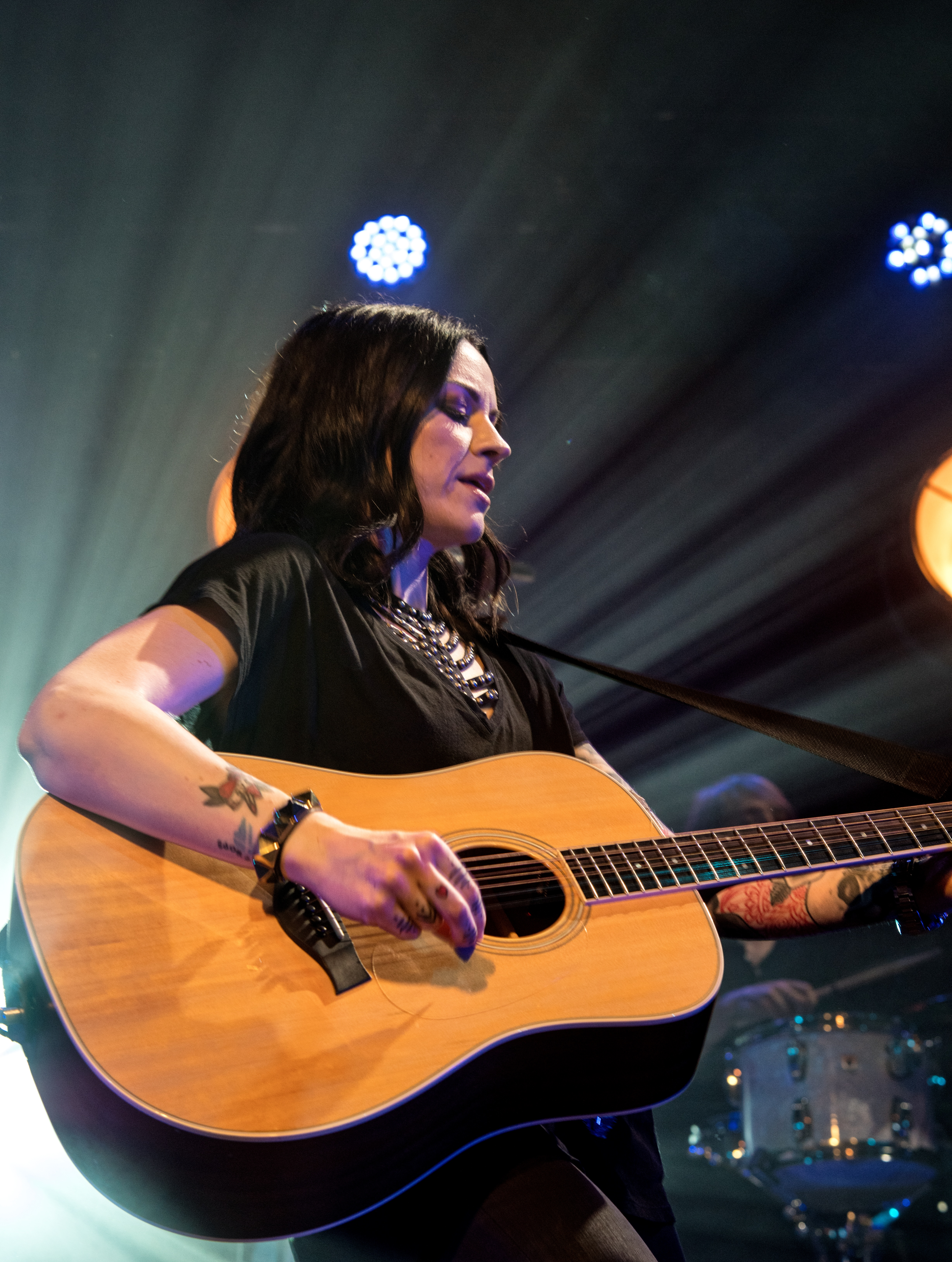 Bilder vom Zelt Musik Festival 2017 in Freiburg im Breisgau